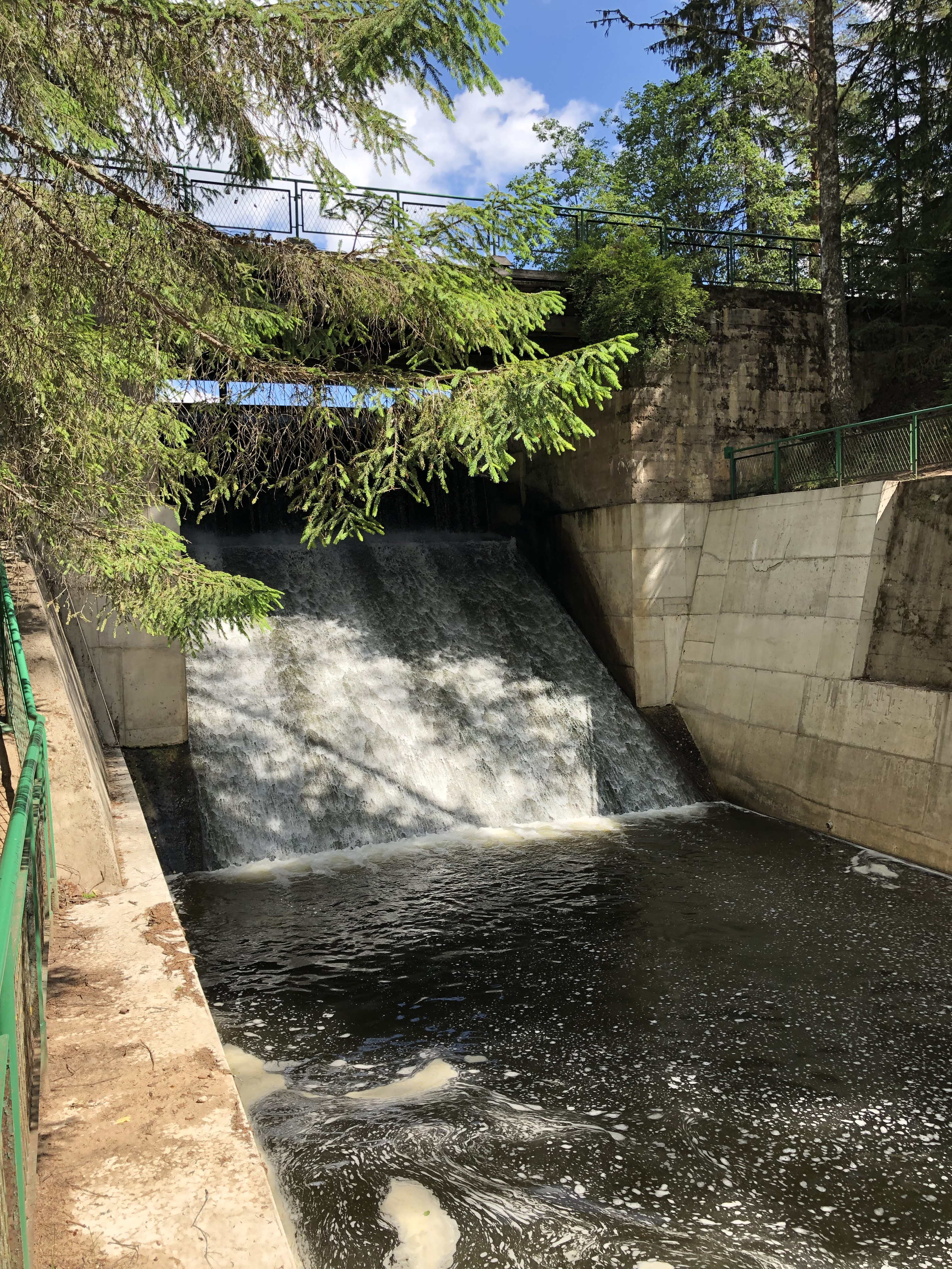 Rekonstrueeritud Saesaare pais aastal 2019.